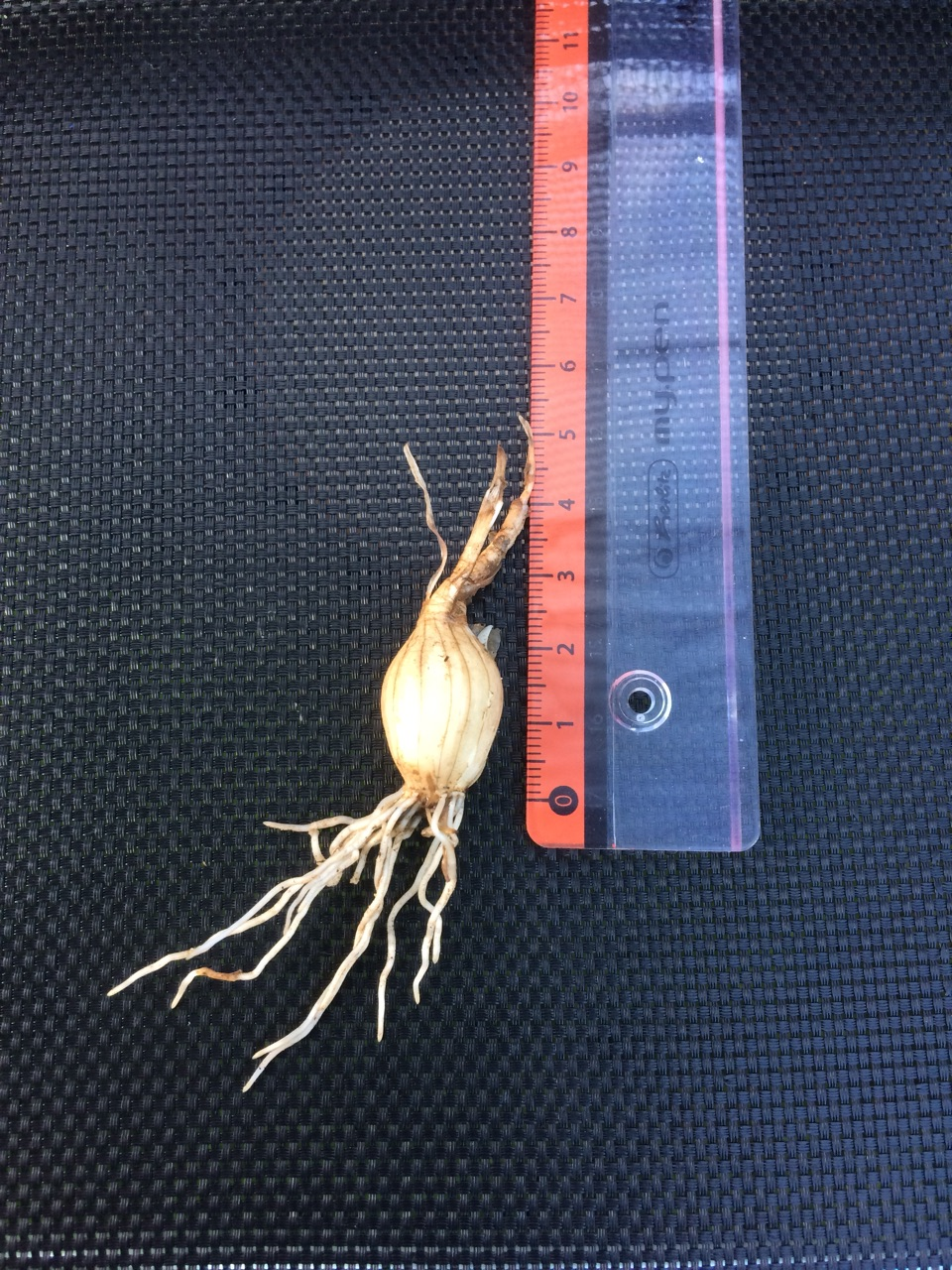 Acis autumnalis bulb